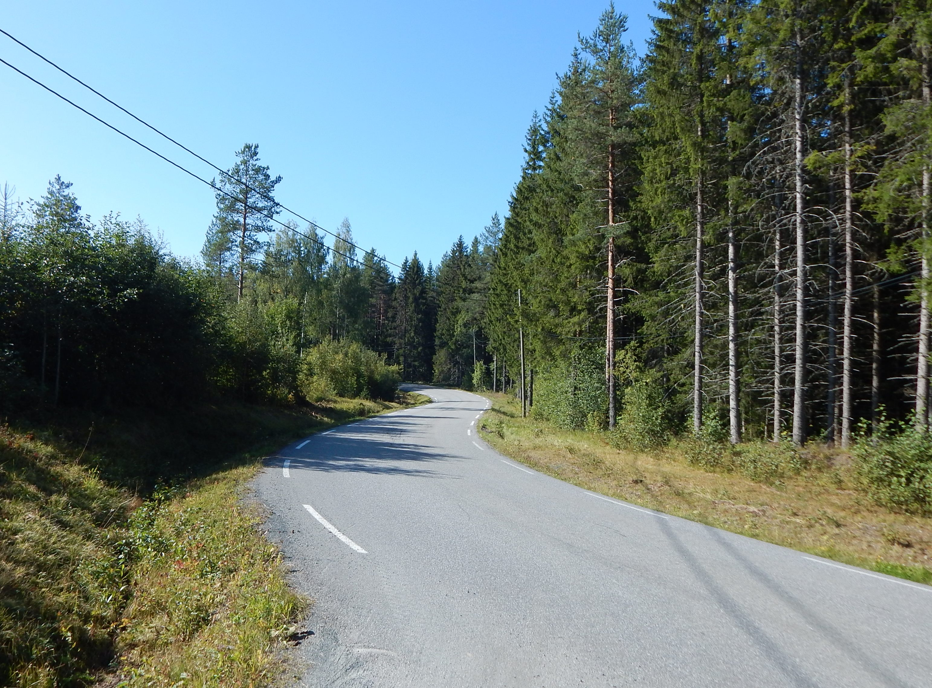 Skonhovdvegen (fylkesvei 2400, tidl. 149) mot sør